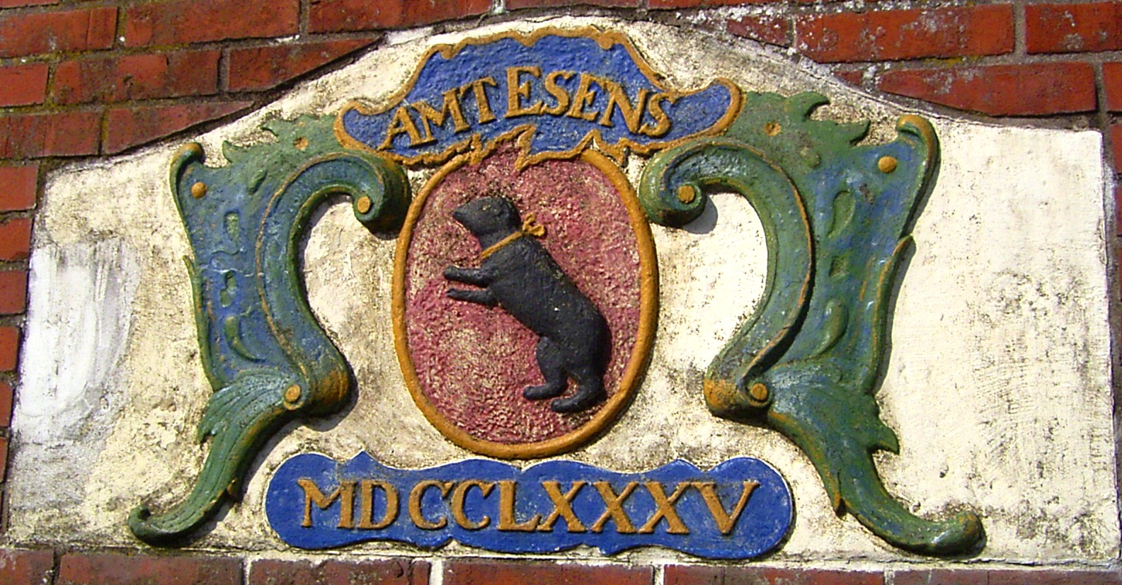 Wappen an einer Säule neben der Sielpumpstation in Neuharlingersiel